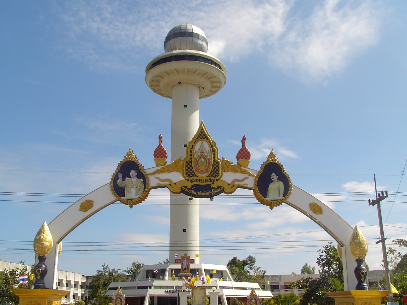 Mukdahan Haw Kaew Archway